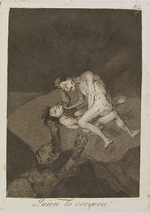 Capricho nº 62: ¡Quién lo creyera! de Goya, serie Los Caprichos